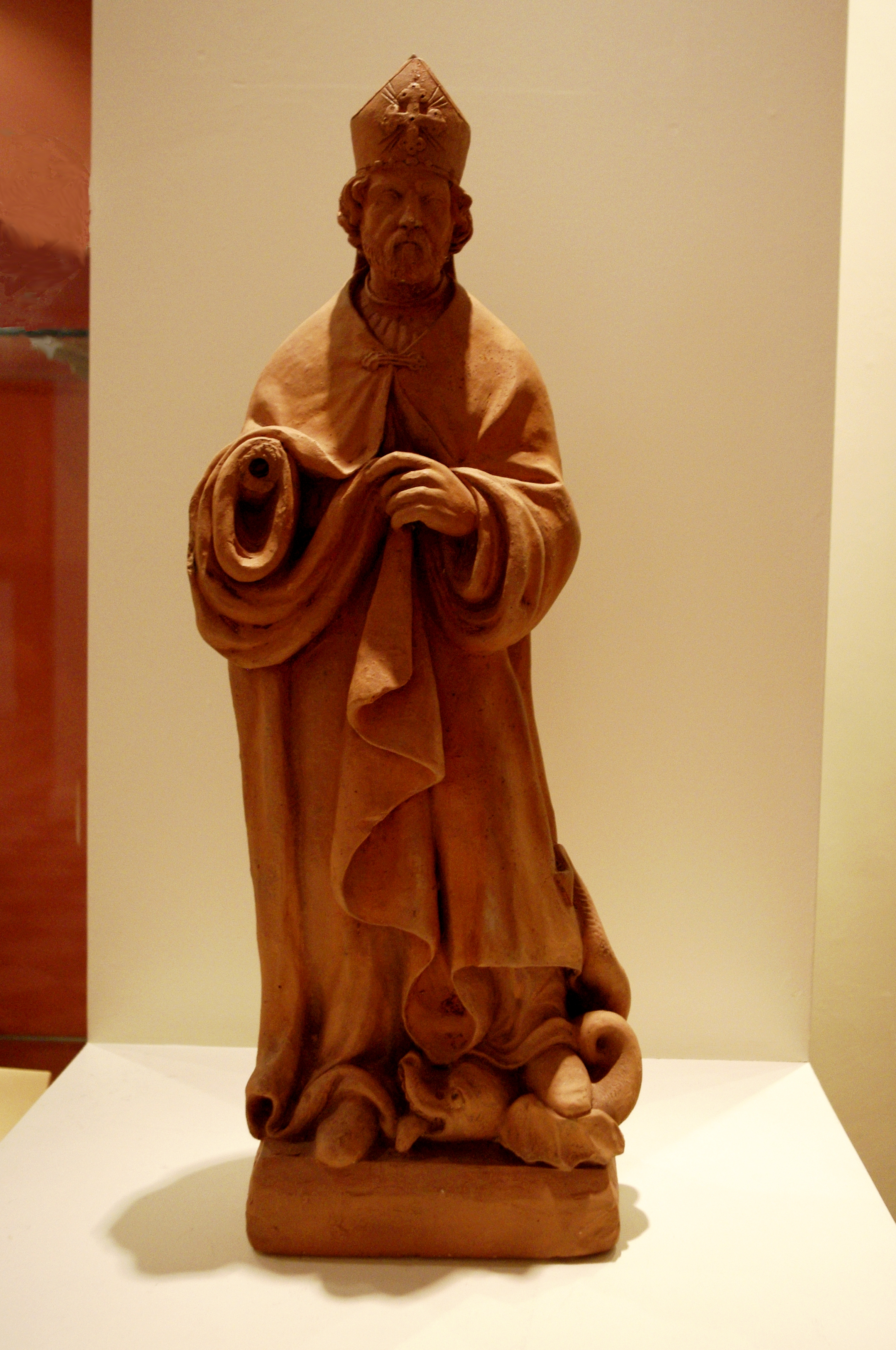 Musée communal de Huy - Auguste Geedts (1827-1902) Saint Domitien, plâtre peint de 1850